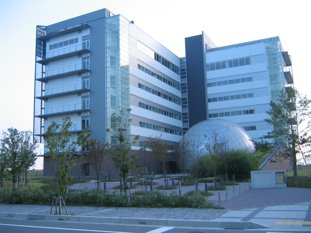 甲南大学フロンティアサイエンス学部(FIRST)。兵庫県神戸市中央区港島南町7丁目1番20